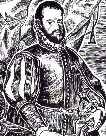 fundador de la provincia de corrientes,Argentina